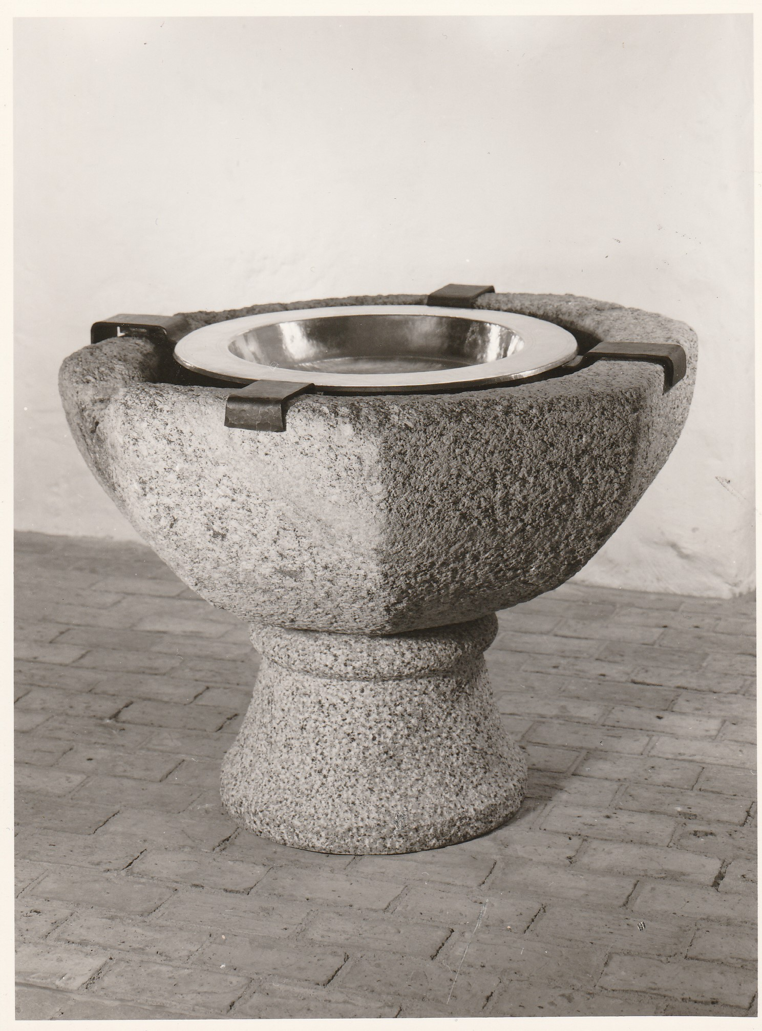 Granittaufe der Kirche St. Georg auf dem Berge in Ratzeburg